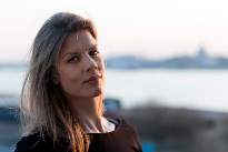 Foto: Steen Brogaard